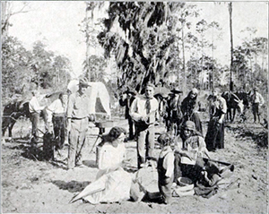 Gene Gauntier (center).